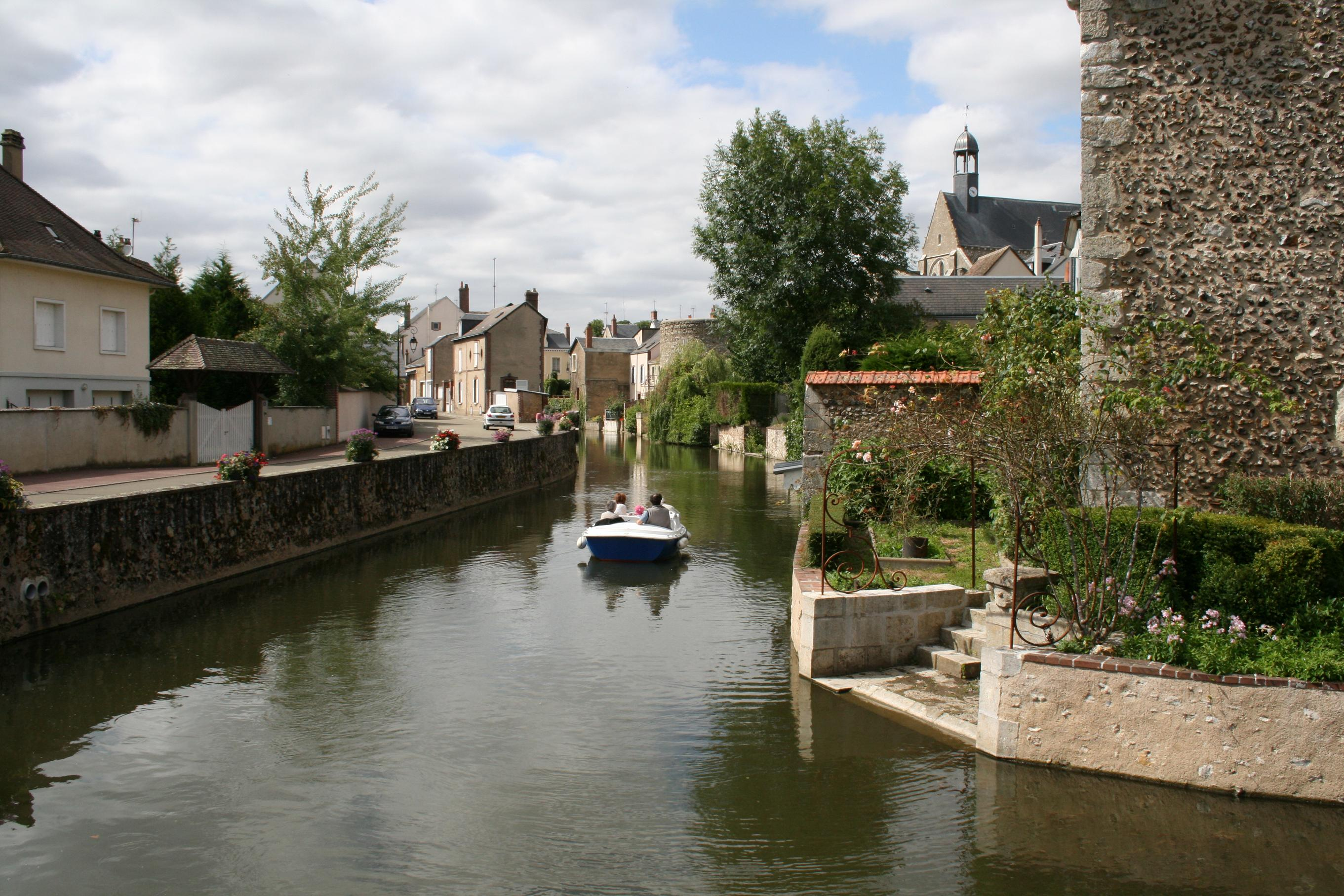 Bonneval - Canal (Eure-et-Loir - France).